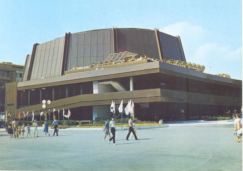 Фестивалният и конгресен център е посочен в допитване до варненци като един от символите на града. ФКЦ е открит на 16 юни 1986 г.